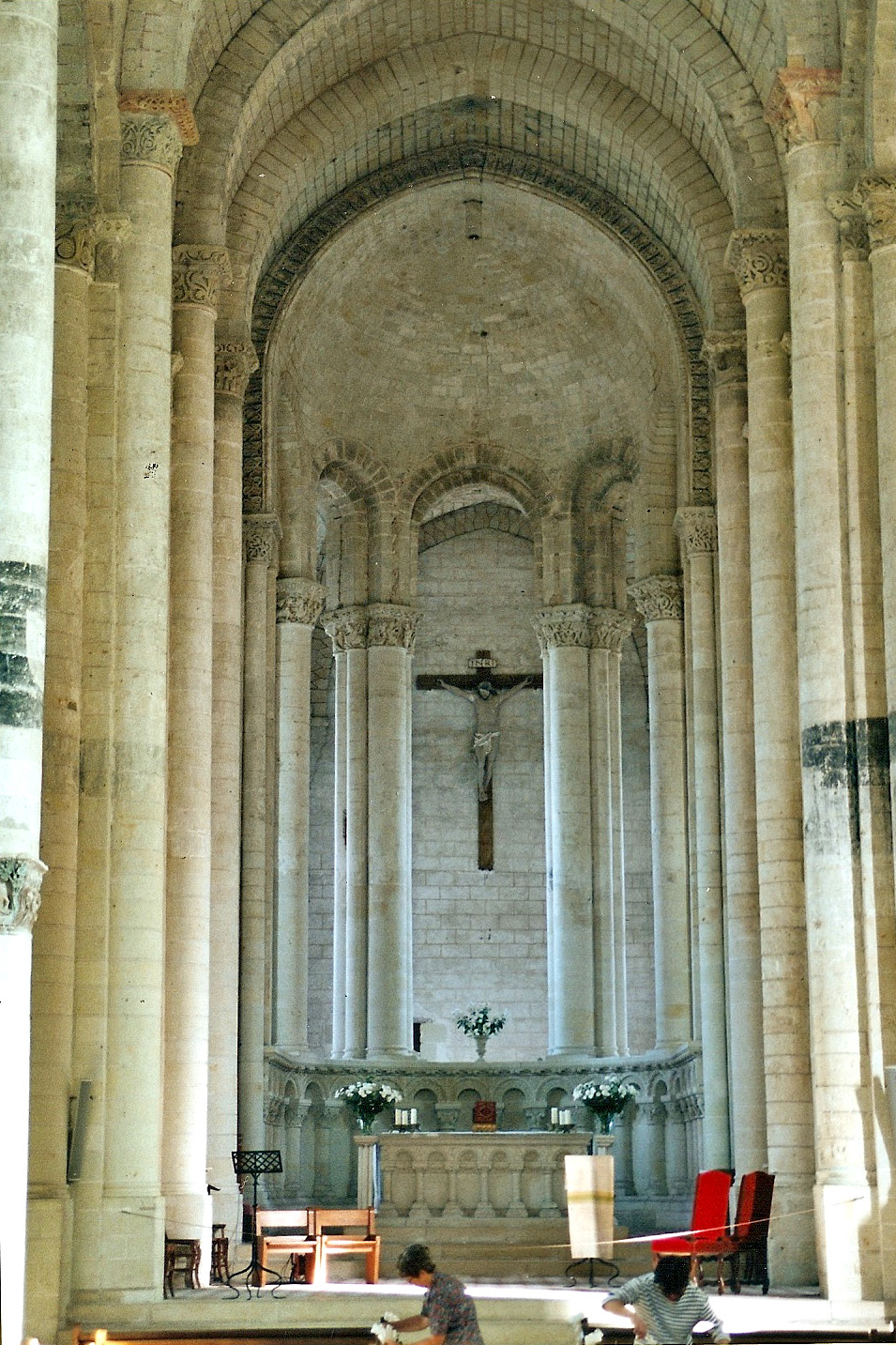 N.-D. Cunault, Chor, Chorapsis und Umgang